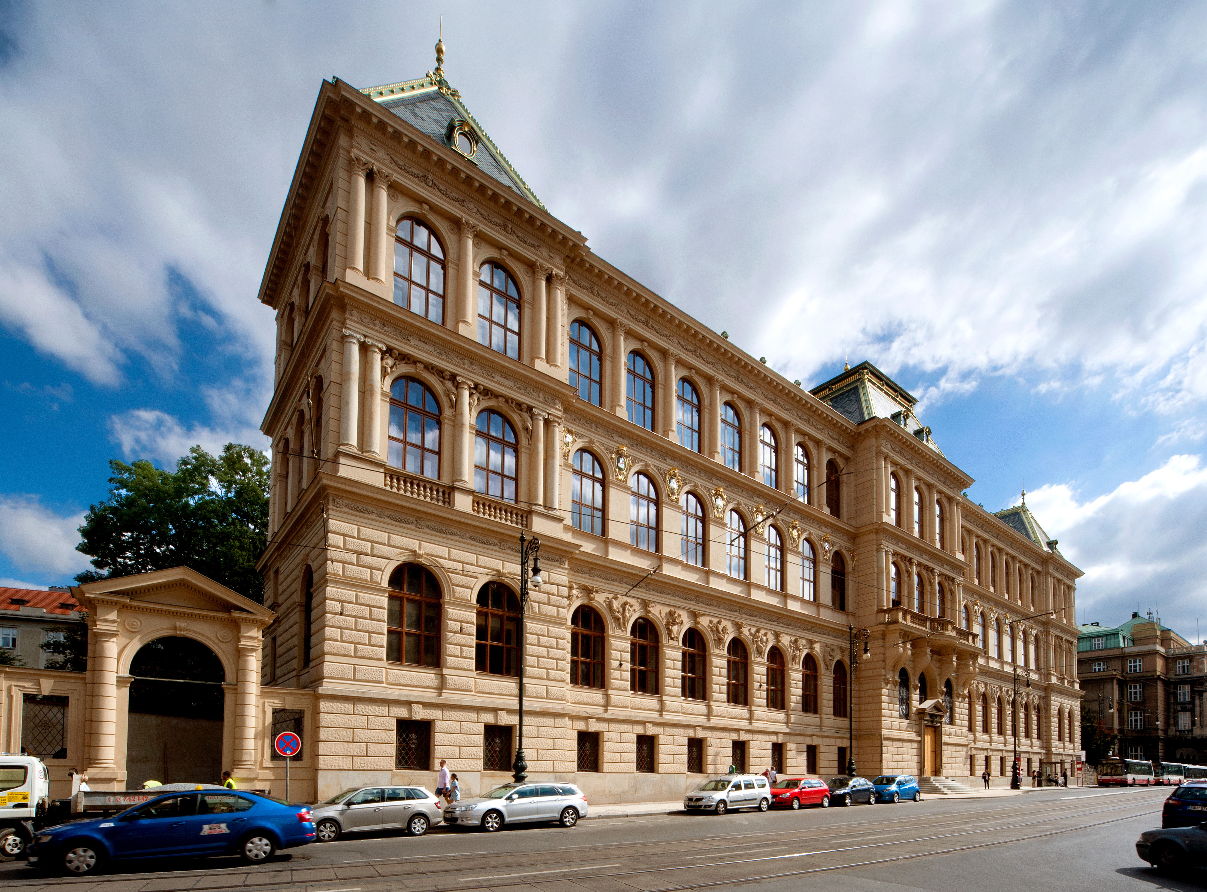 Uměleckoprůmyslové museum v Praze, hlavní budova